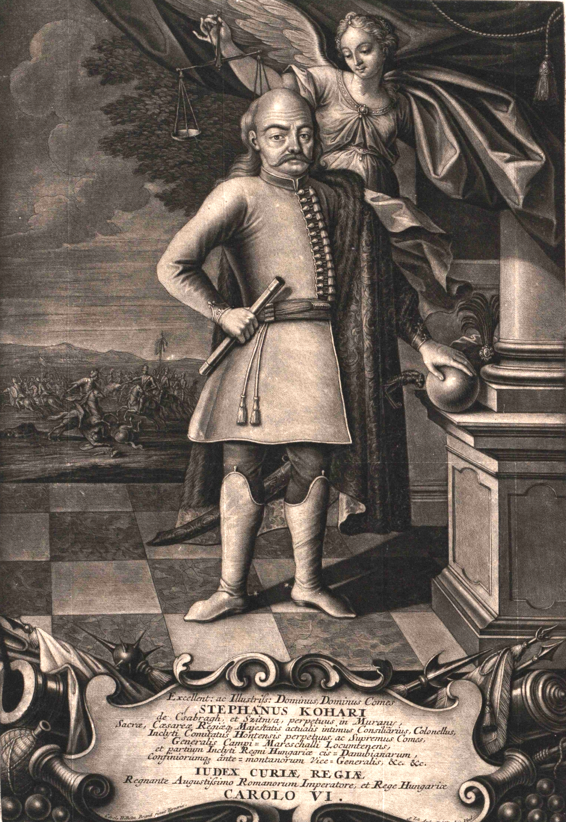 Koháry II.István,országbíróvá választásakor (1649–1731) A Felső-Magyarország gyöngyének nevezett Füleki vár főkapitányi tisztét a XVII. században a ferenceseket 1612-ben Fülekre visszahívó Bosnyák Tamás (1605–1634), Wesselényi Ferenc (1634–1644), Koháry (I.) István (1657–1664), majd fia, Koháry (II.) István (1664–1682) töltötték be.